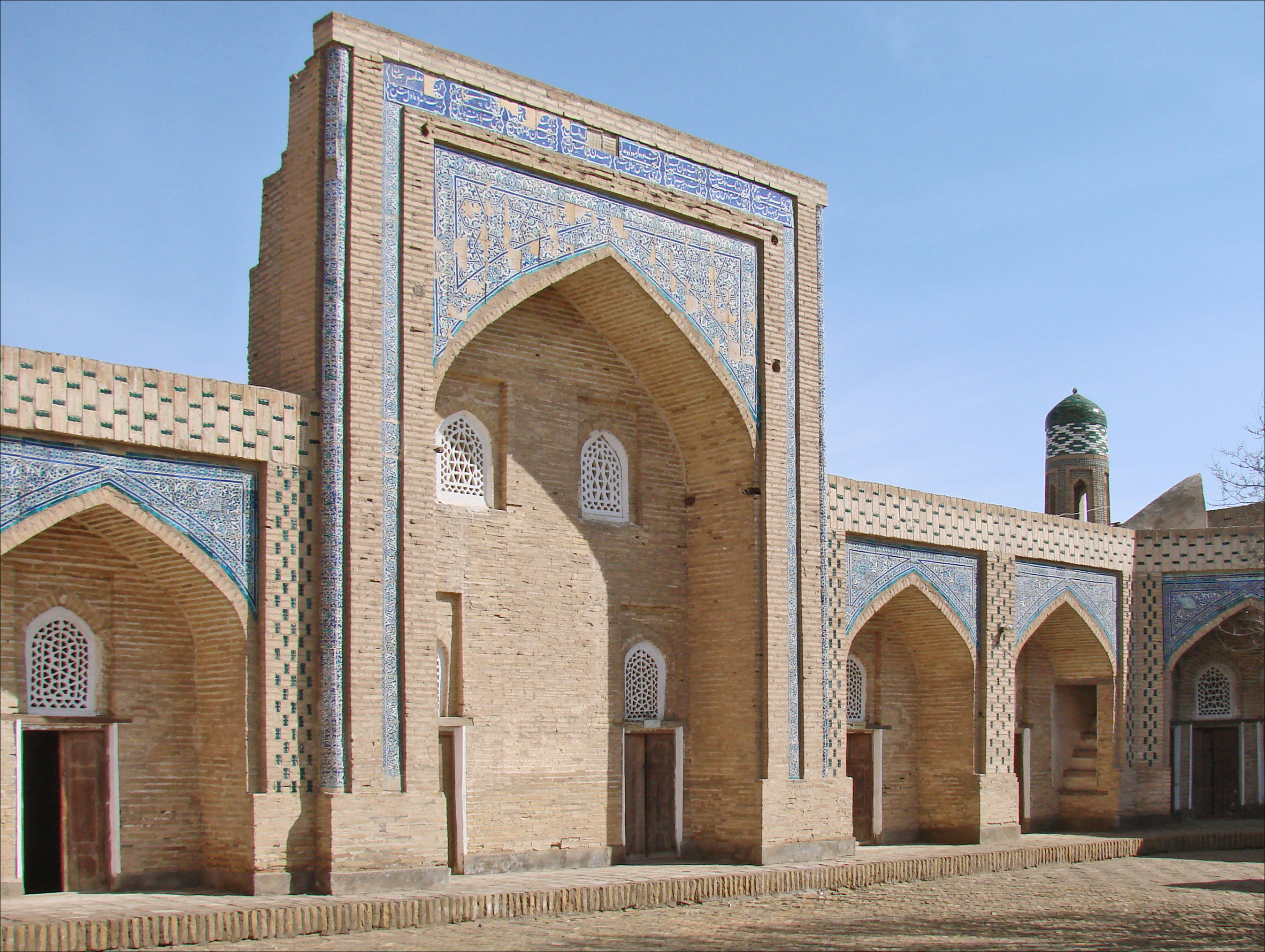 Cour intérieure de la médersa. La médersa (madrasa) de Muhamad (Mohammed) Rakhim Khan (1836-1910), appelé également Ferouz ou Firuz sous son nom de poète. Sa construction date de 1871 (ou 1876 ?). C'est sous son règne que le protectorat russe a été instauré en 1873.